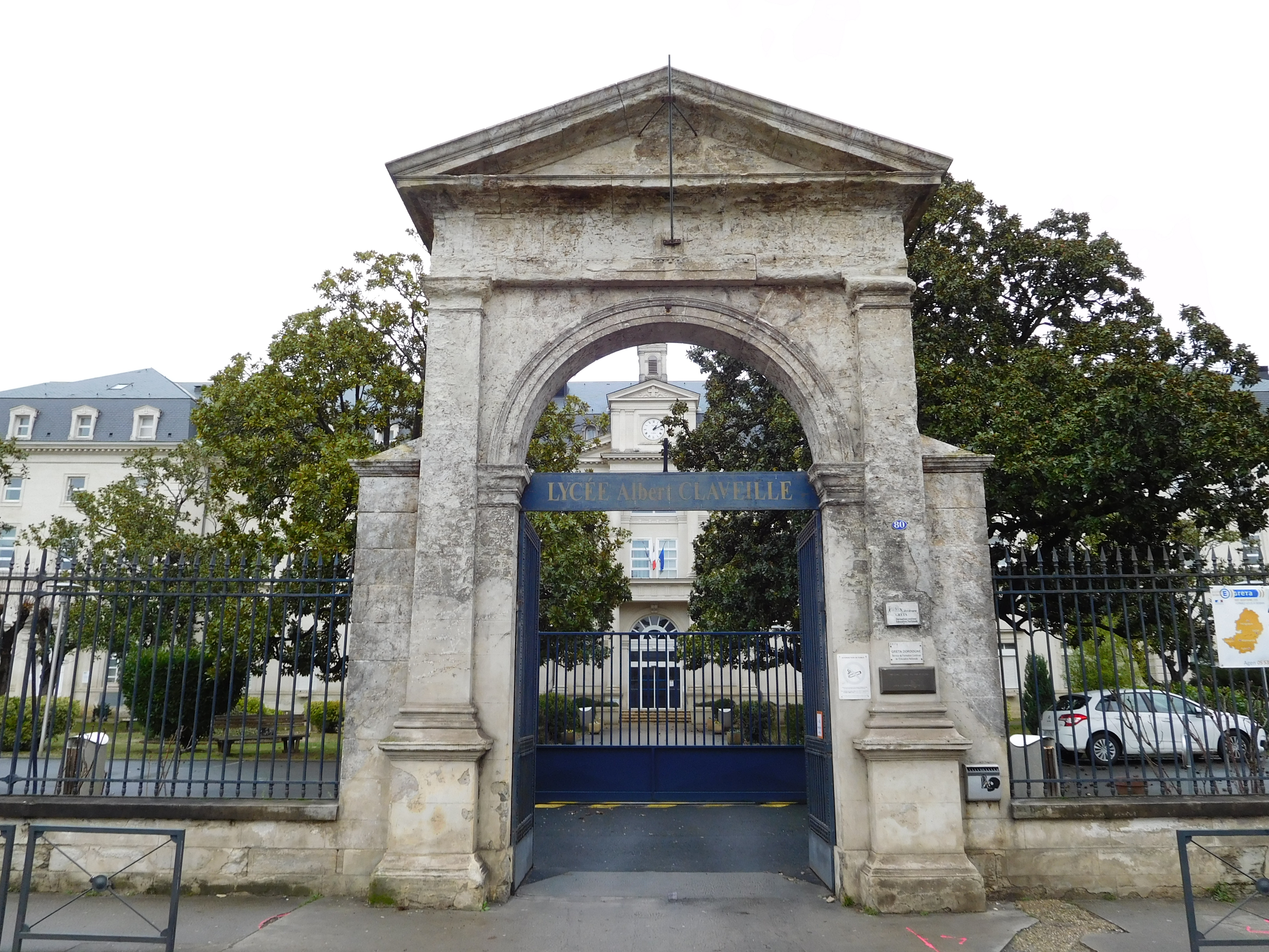 Lycée Albert-Claveille : porche de l'entrée principale. Périgueux (Dordogne, France).